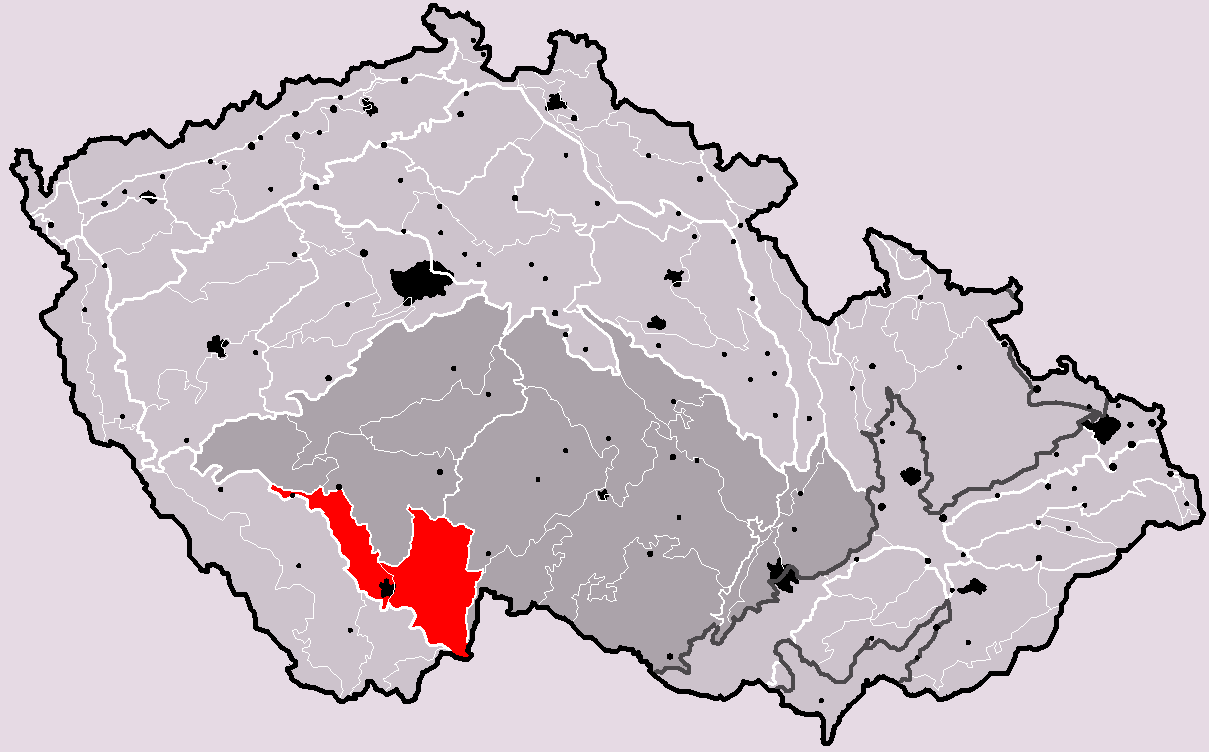 Poloha geomorfologické oblasti Jihočeské pánve v rámci České republiky. Hercynský systém Hercynská pohoří I Česká vysočina I2 (II) Česko-moravská subprovincie I2B (IIB) Jihočeské pánve